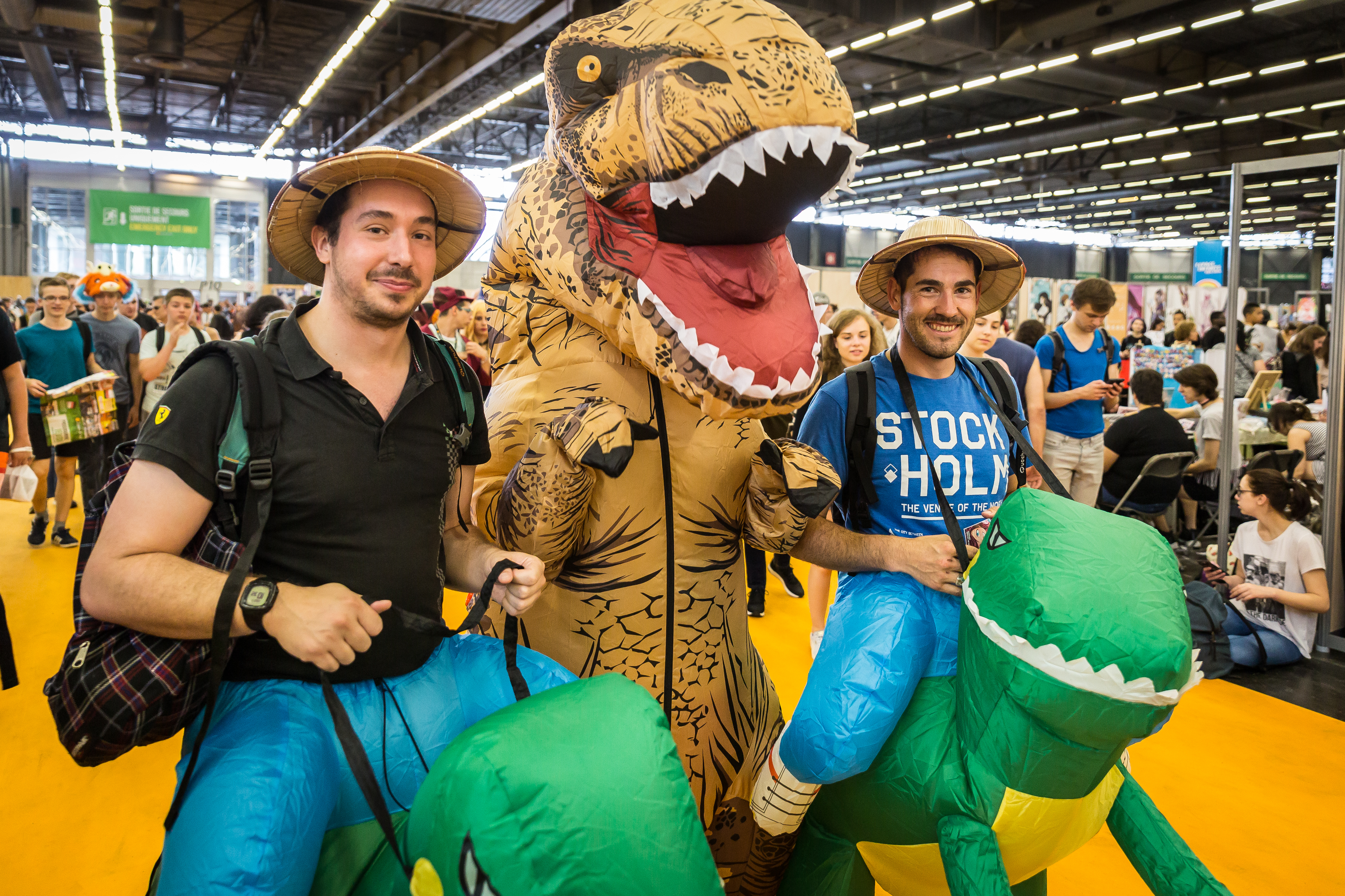 Japan Expo 2017, Parc des Expositions de Villepinte, Paris, France, 6 juillet 2017. Photo: Stéphane Gallay, sous licence Creative Commons (CC-BY)